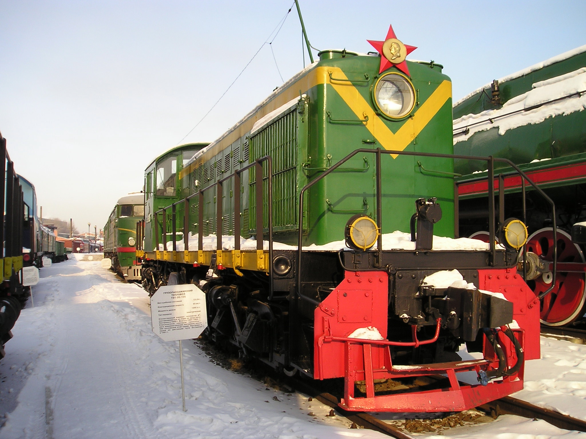 Soviet diesel locomotive - TE1